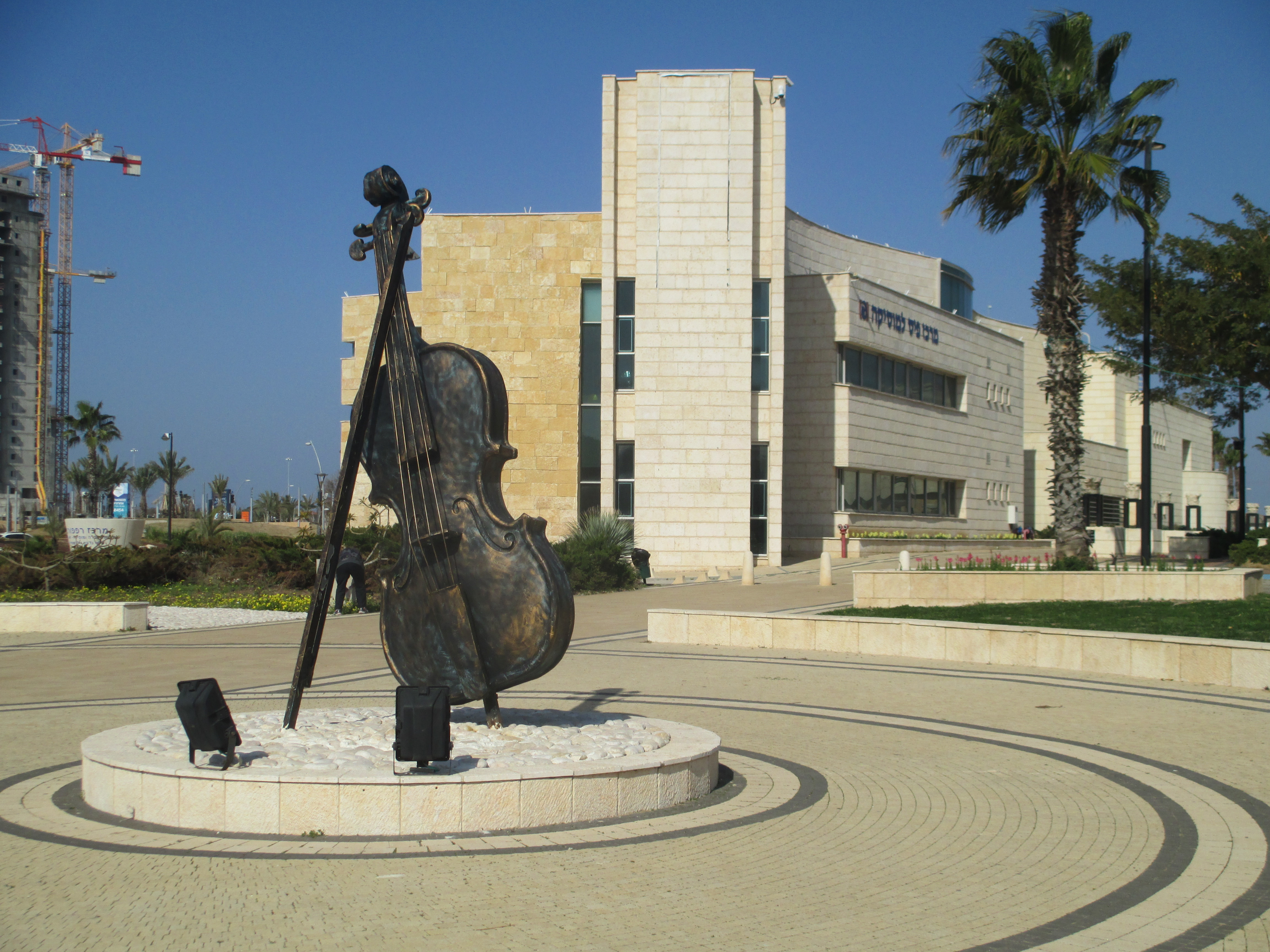 מרכז המוזיקה באור עקיבא